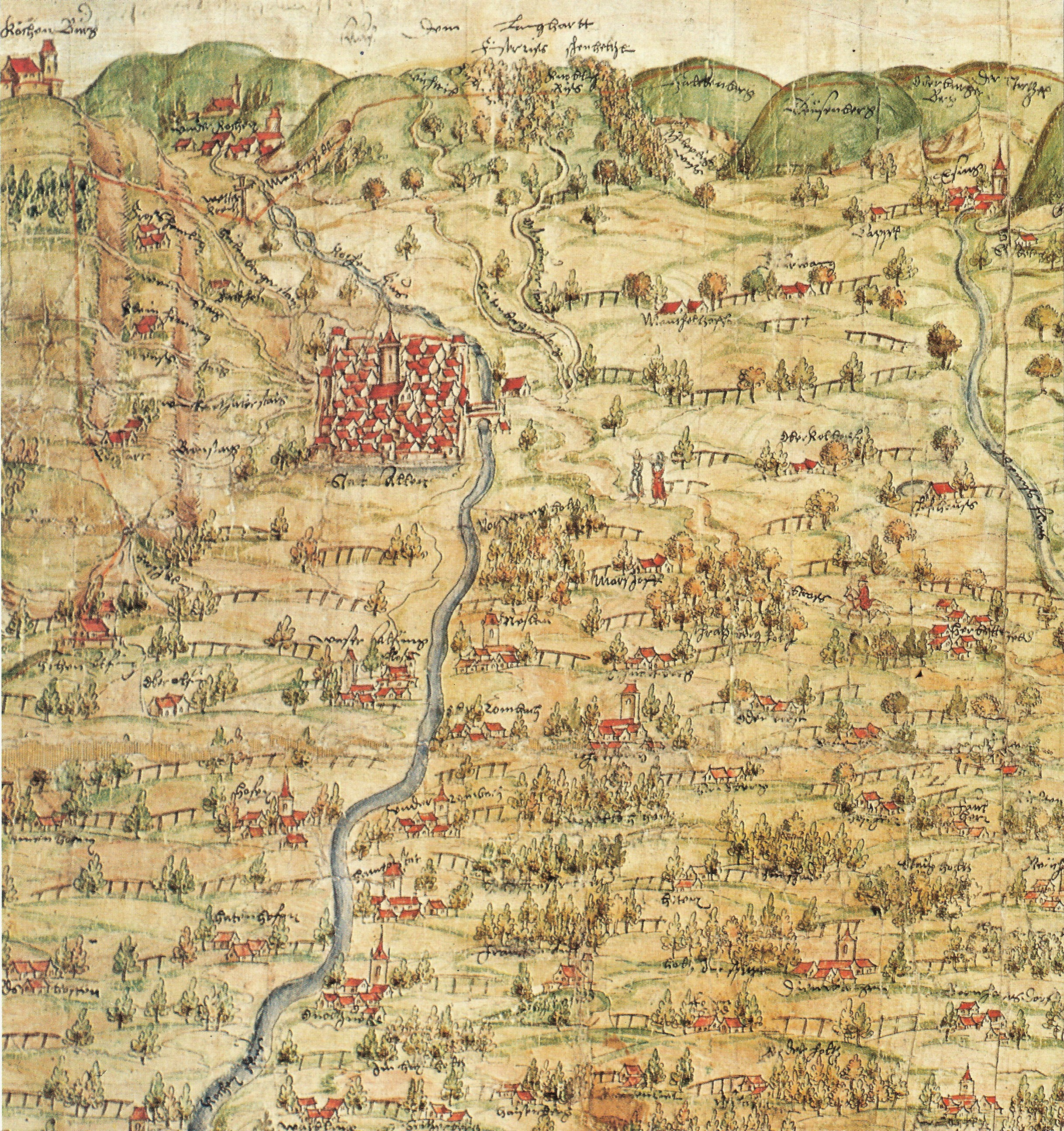 Aalen und Umgebung auf der Gmünder Pirschkarte von 1572